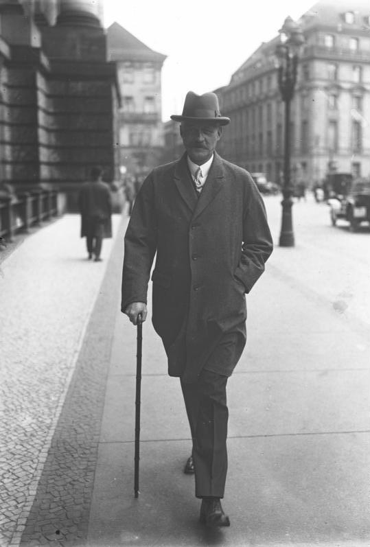 Von Kardorff, Vizepräsident des deutschen Reichstages! Reichstagsabgeordneter von Kardorff wurde mit grosser Mehrheit zum Vizepräsidenten des Reichstages gewählt. Die Wahl war nach dem Rücktritt des Nationalsozialisten Stöhr notwendig geworden.